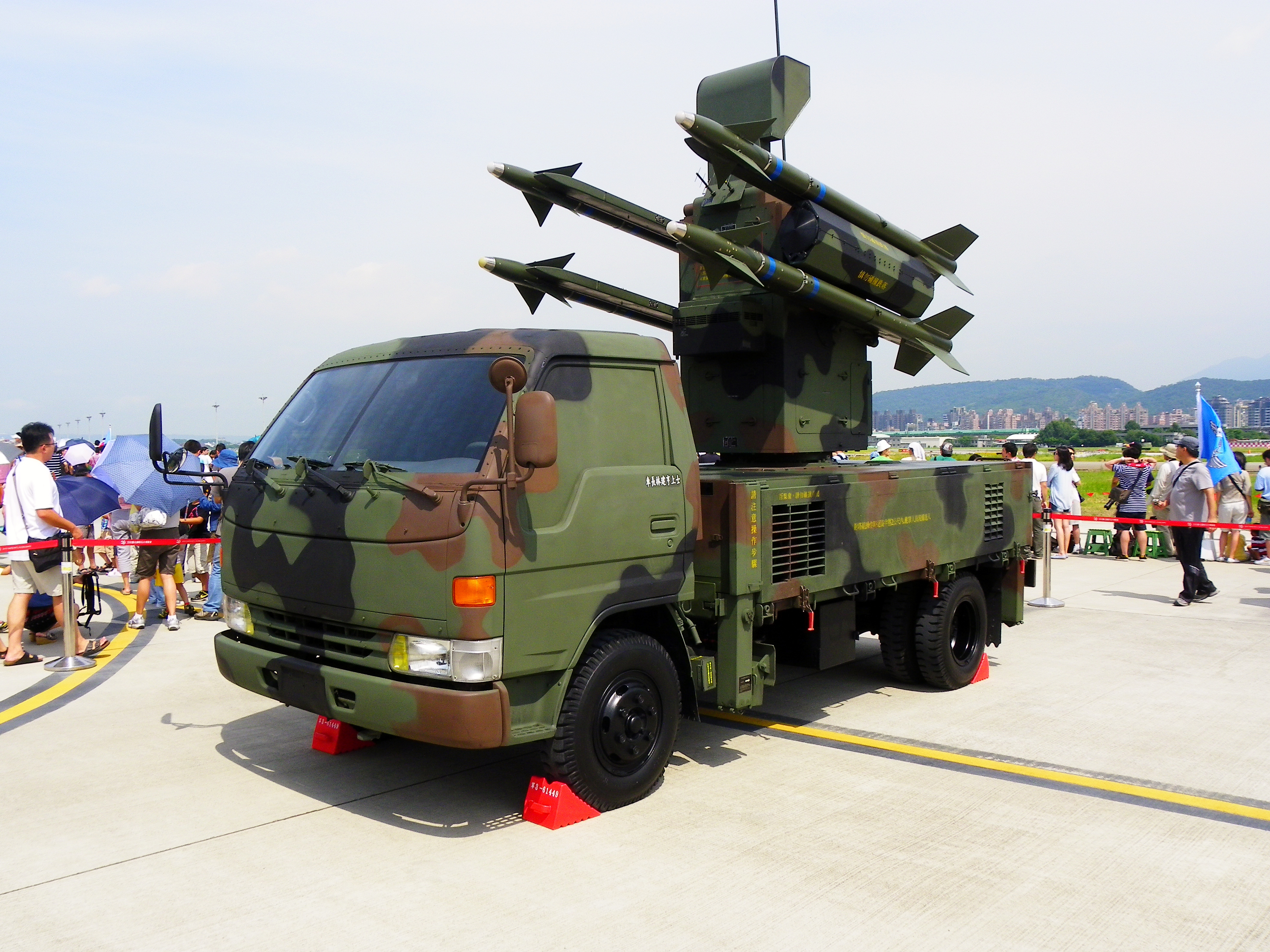 2011年8月13日空軍松山基地營區開放活動，展示之捷羚防空飛彈系統。